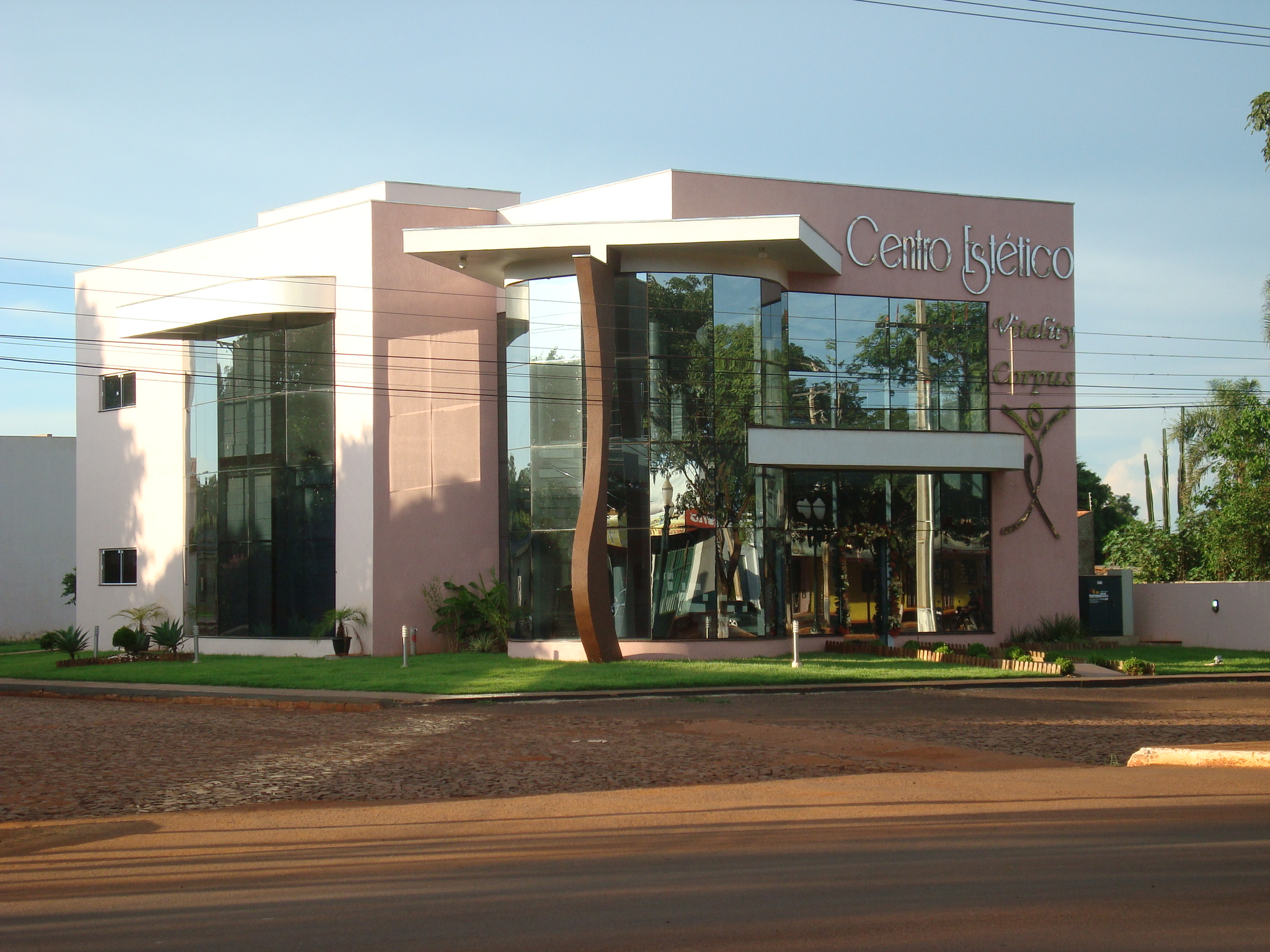 Edificio en katueté